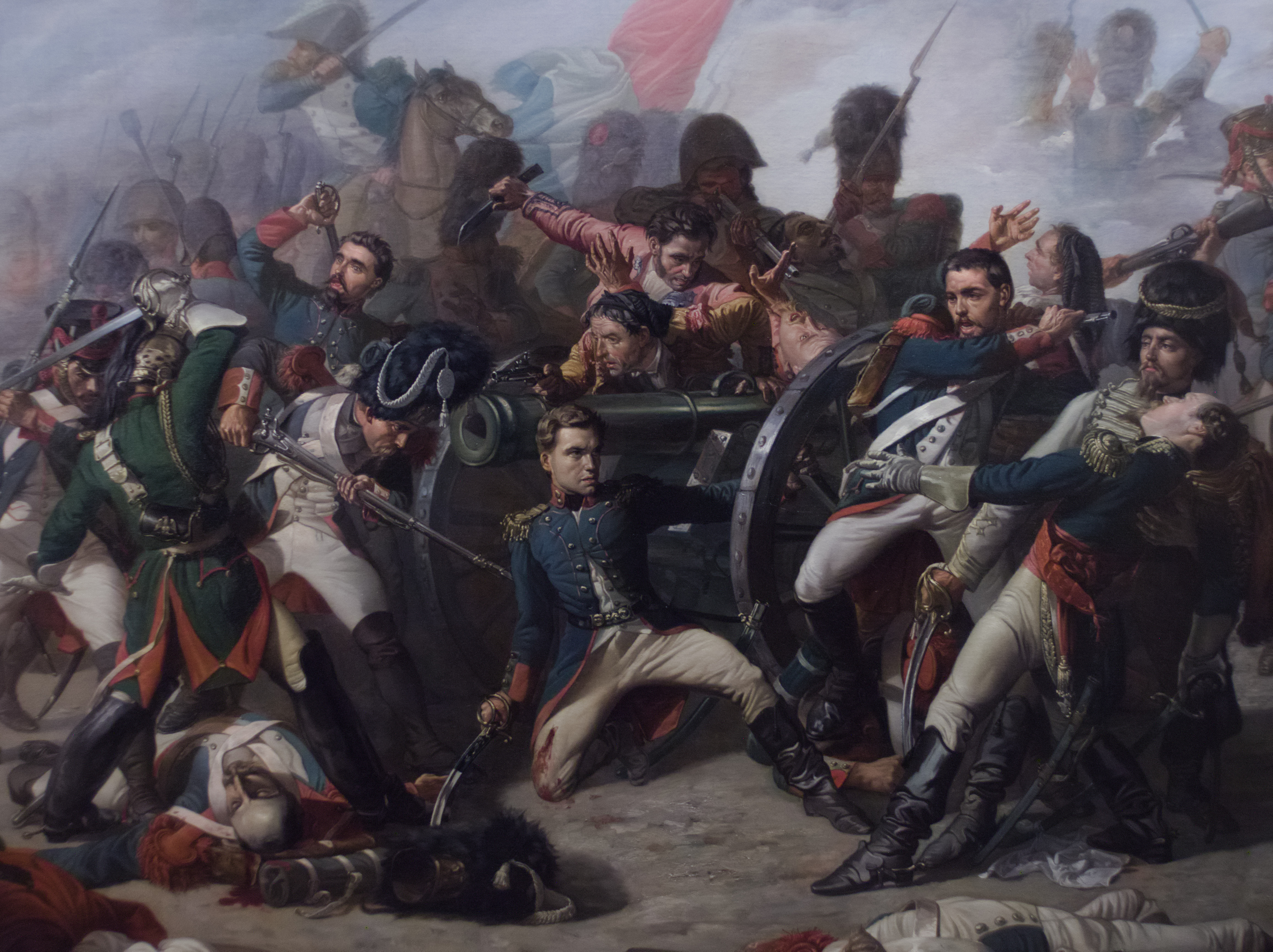 «Muerte de Daoiz y defensa del parque de Monteleón», de Manuel Castellano. 1862. Óleo. Inv. 19409.